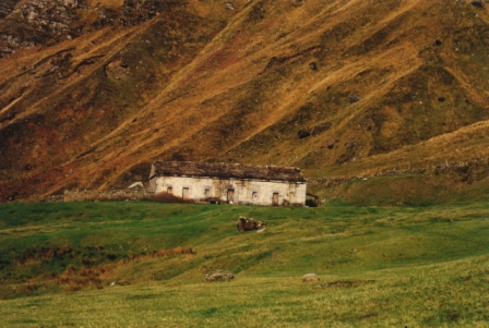 Casa de la Pila. Servia como almacen y casa para los supervisores.